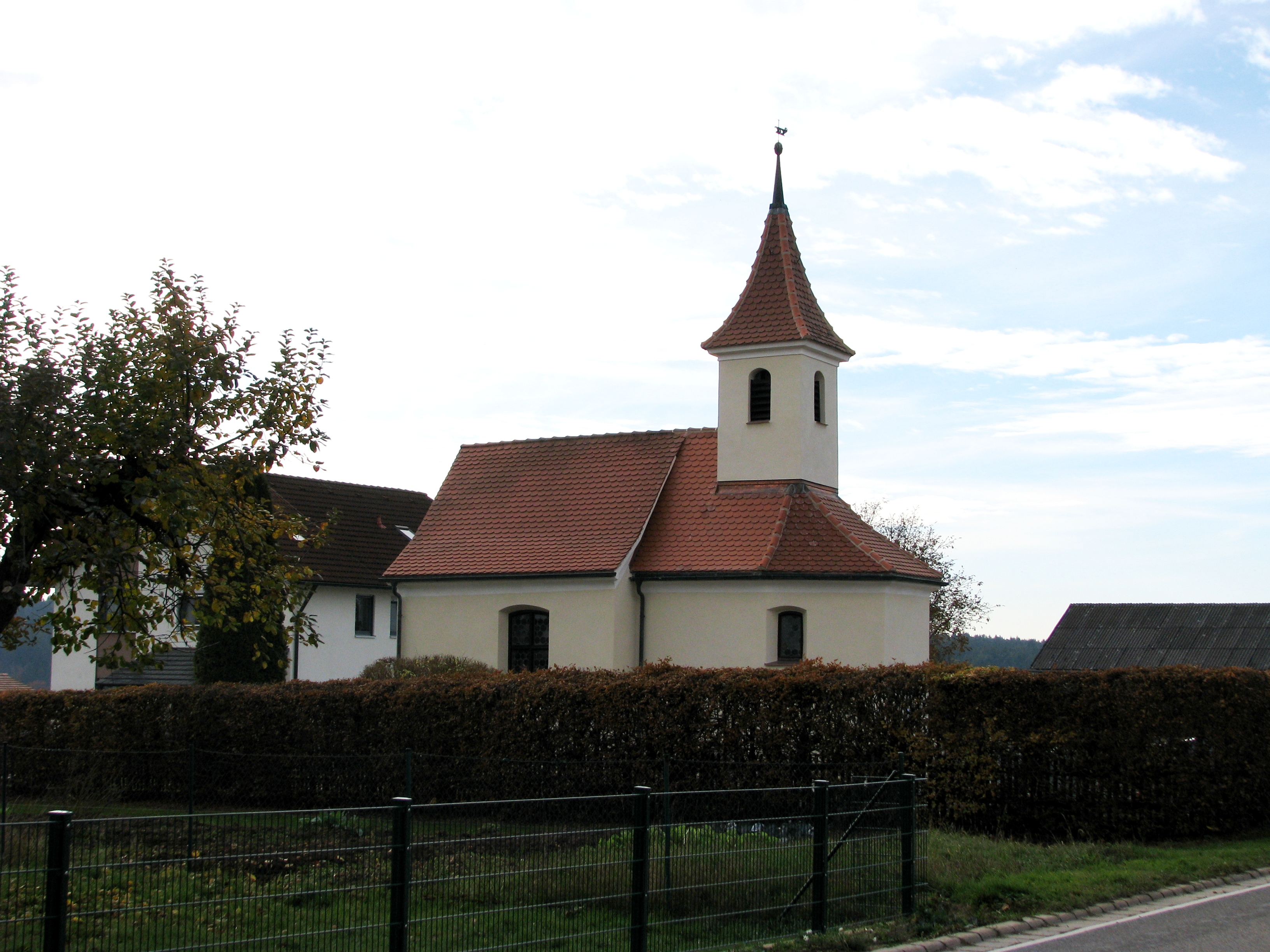 Kaising, Ortsteil der Stadt Greding im mittelfränkischen Landkreis Roth in Bayern, Mariahilf-Kapelle